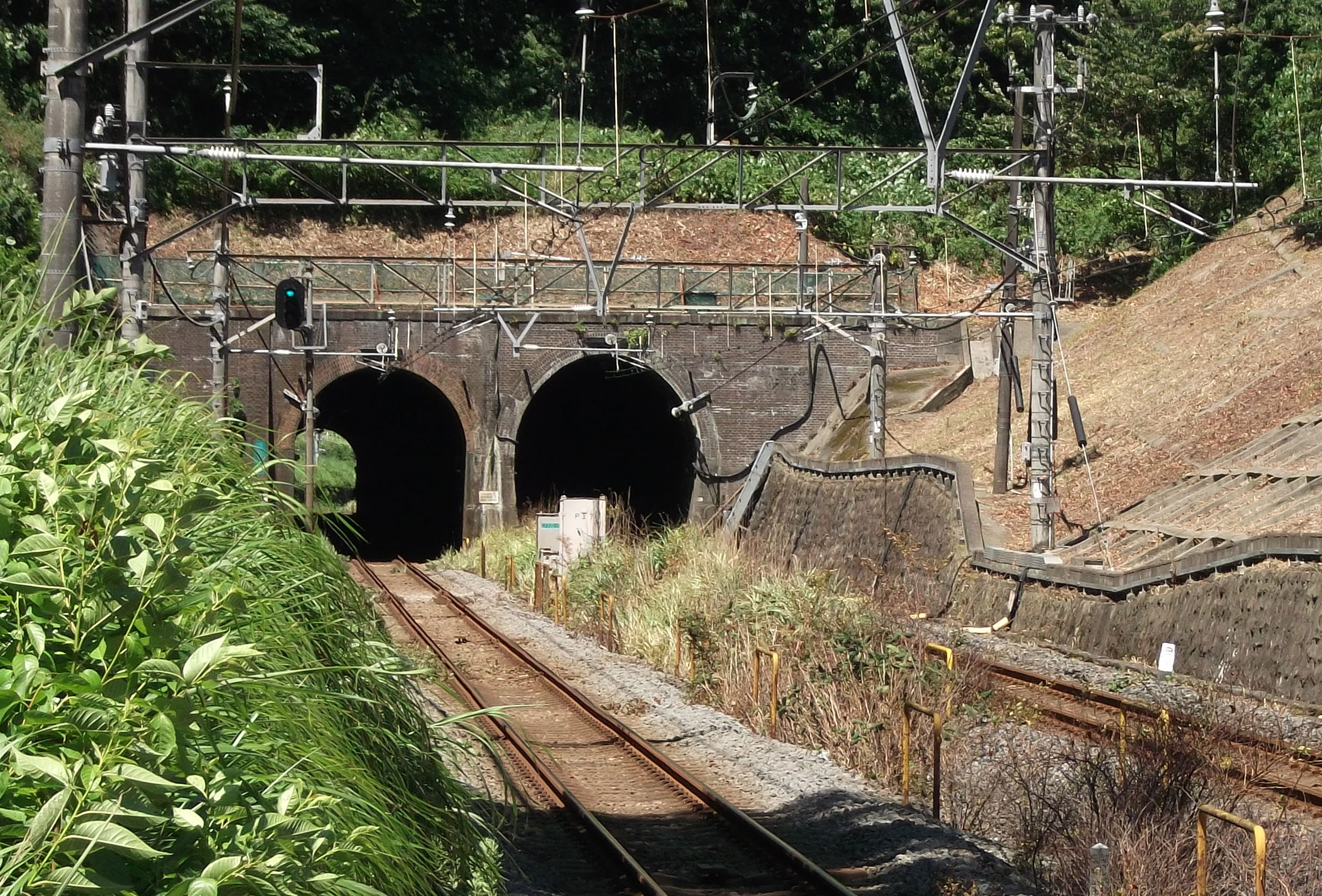 日本最古の現役鉄道トンネル 清水谷戸トンネル 横浜市戸塚区